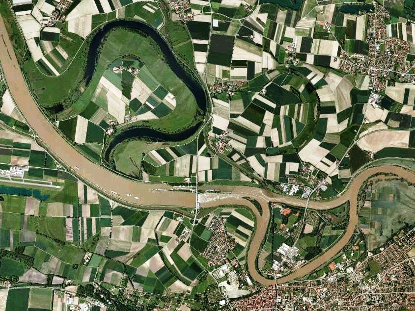 Luftaufnahme der Bayerischen Vermessungsverwaltung: Alt- und Nebenwasser der Donau bei Straubing, Bayern.